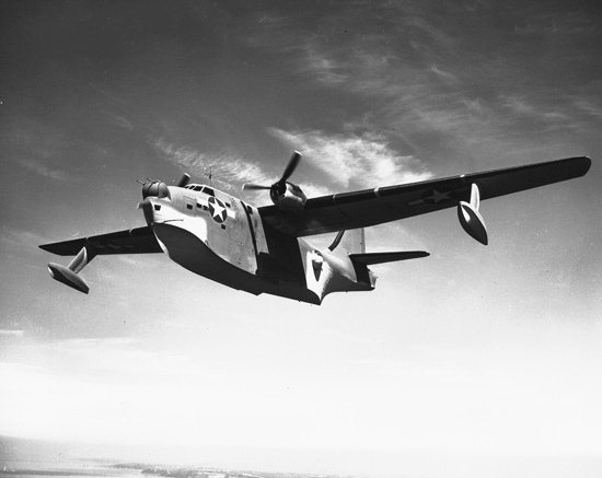 A Boeing XPBB-1 (BuNo.3144) in 1943.